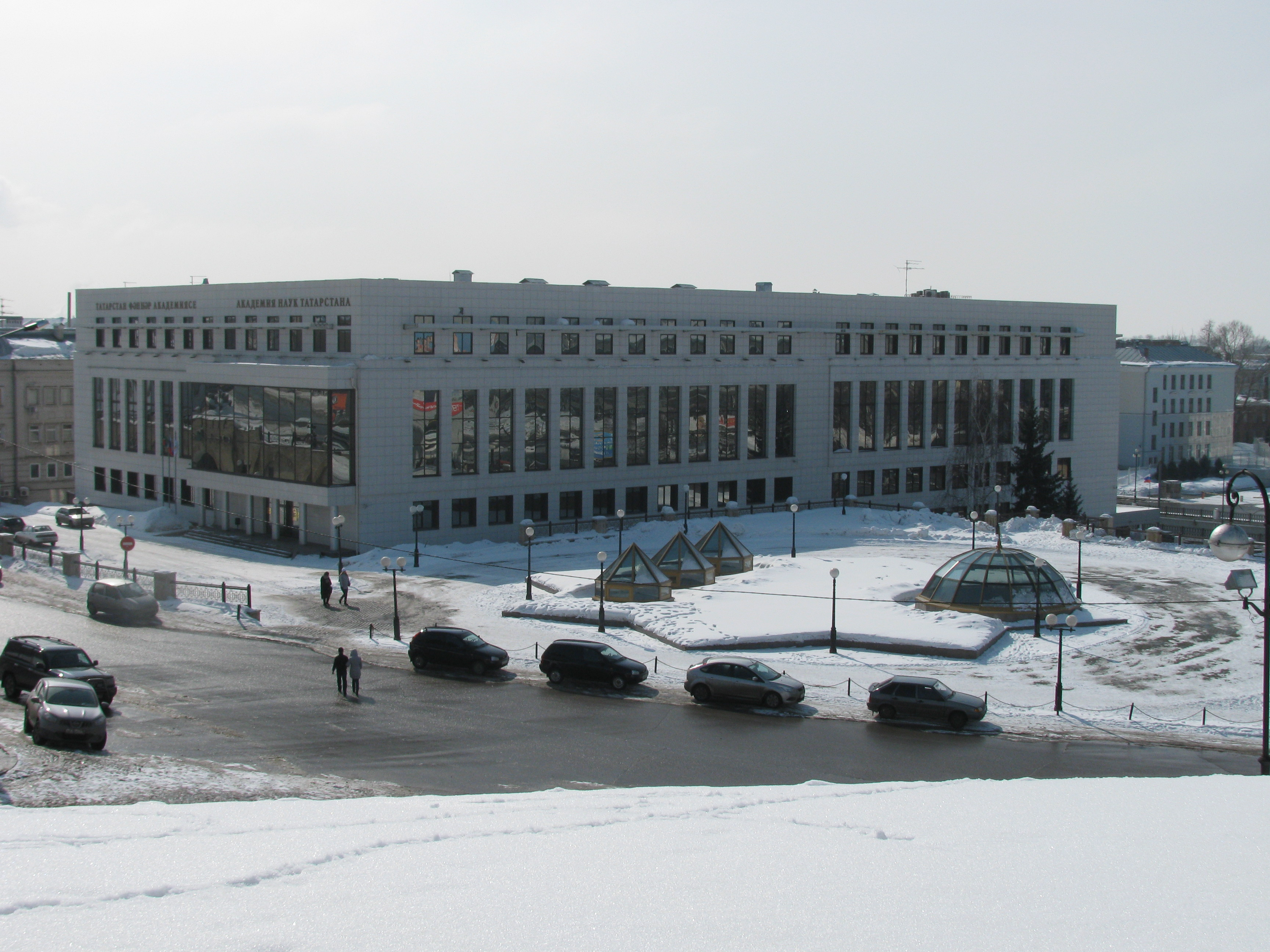 Академия наук РТ